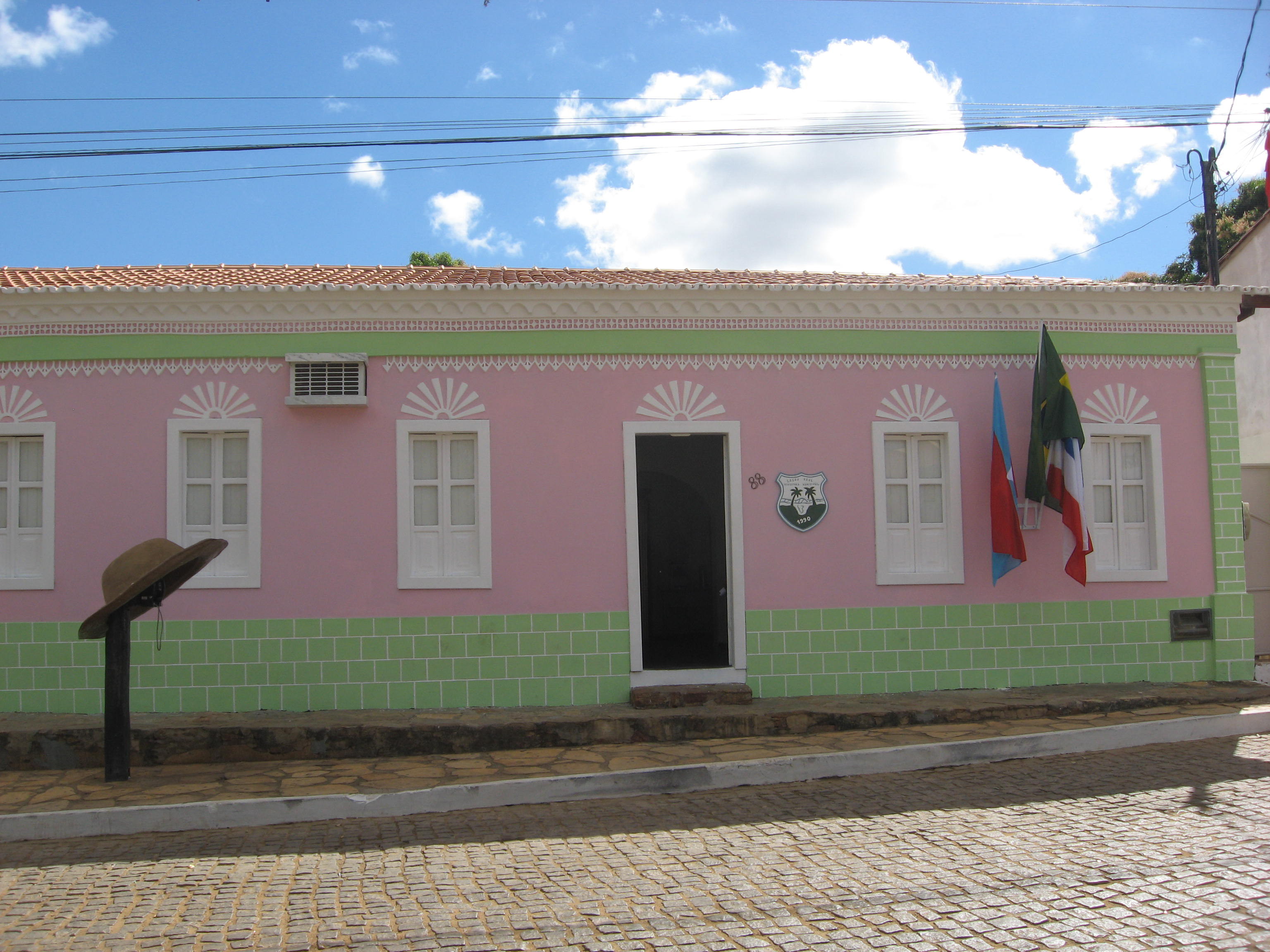 Prefeitura de Lagoa Real, antes da "Festa do Vaqueiro", 2013